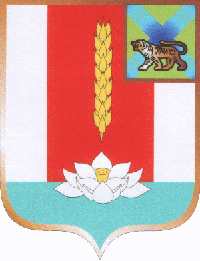 Герб села Чернігівка (Приморський_край).: Герб села Чернігівка (Приморський край), Росія